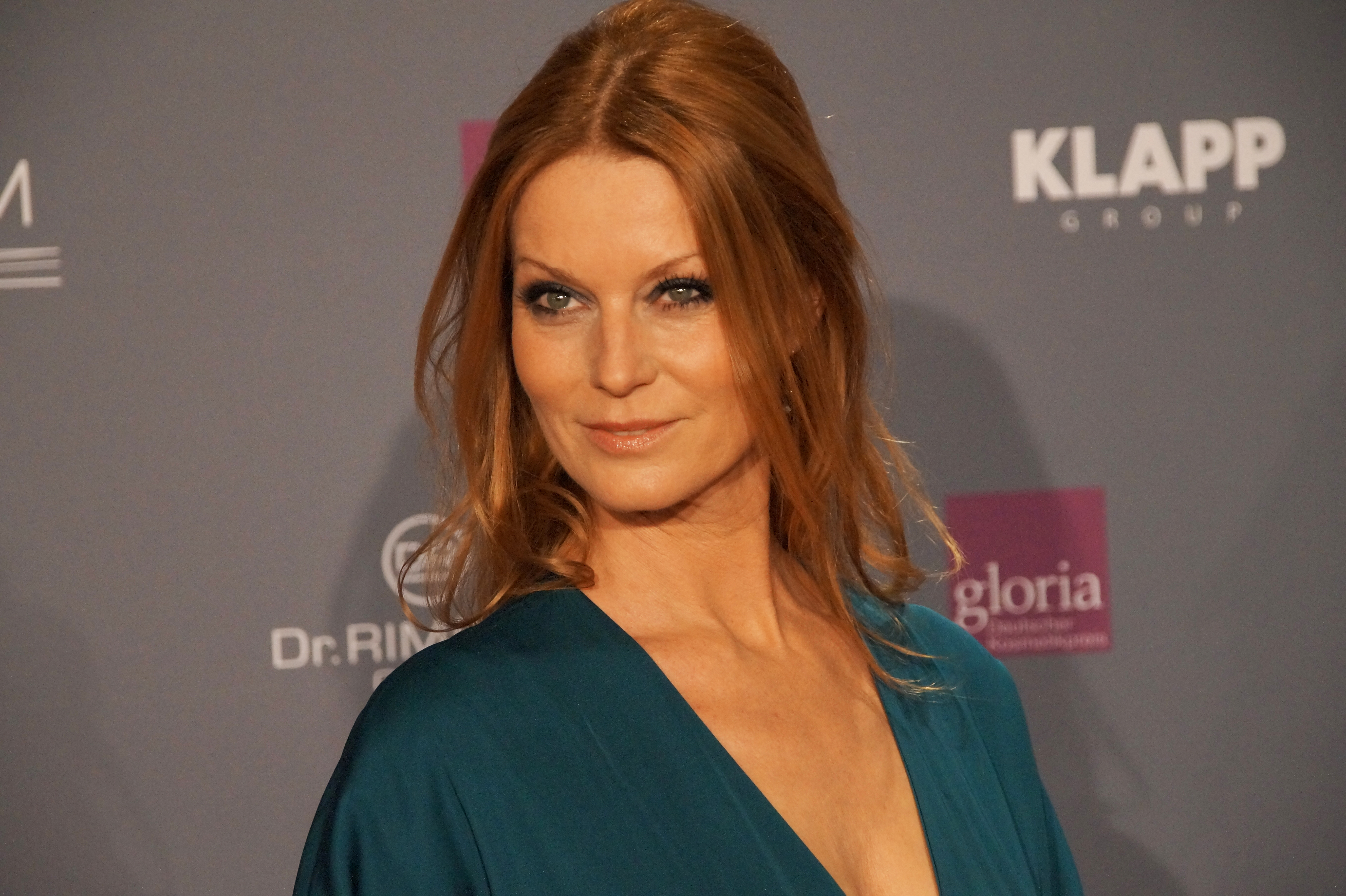 Esther Schweins beim "Gloria – Deutscher Kosmetikpreis" am 04. März 2016 im Hilton Hotel Düsseldorf.